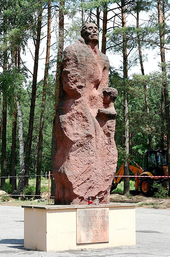 Pomnik na terenie obozu postawiony w 1965 r.